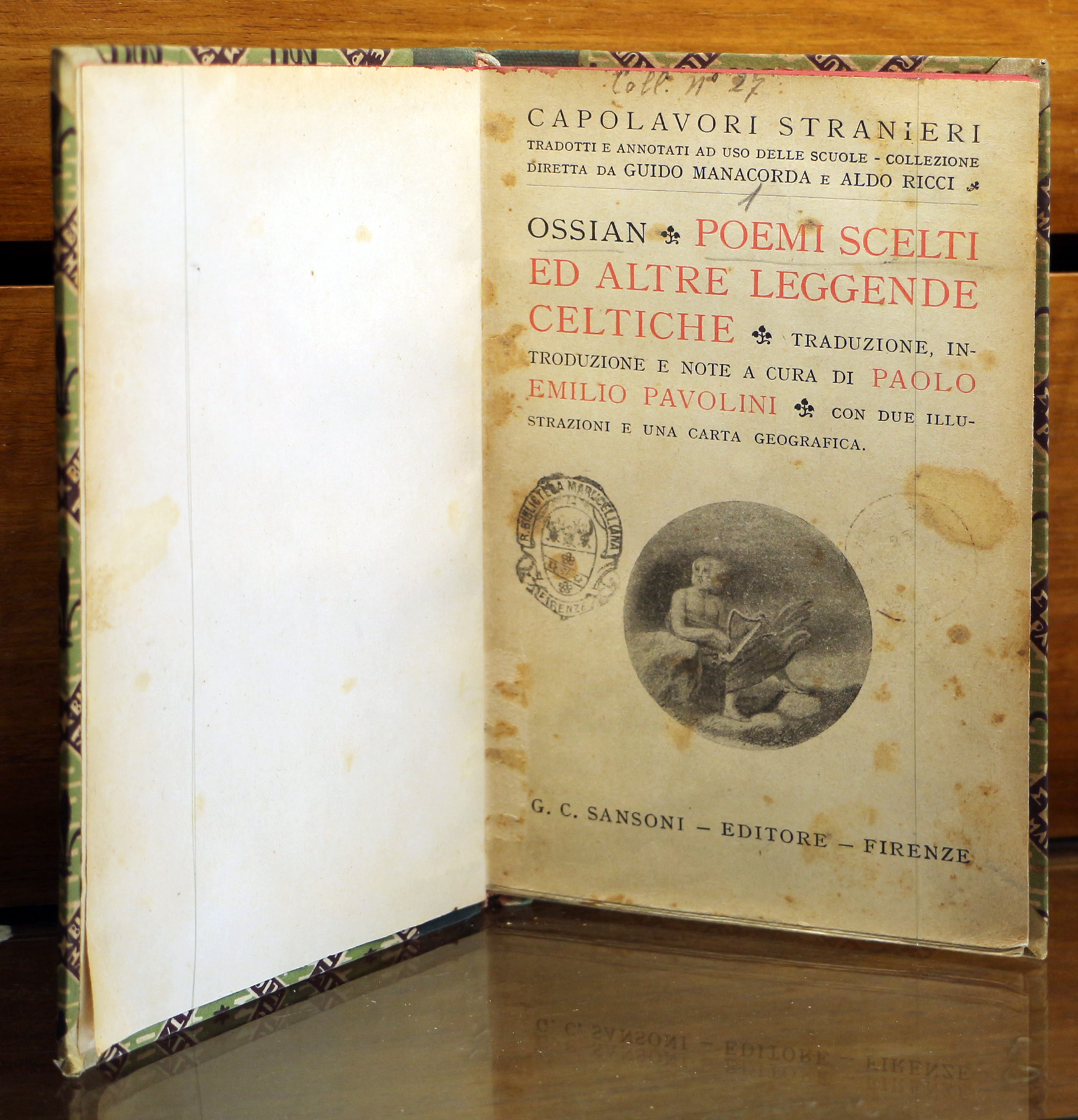 Biblioteca Marucelliana This is a photo of a monument which is part of cultural heritage of Italy.